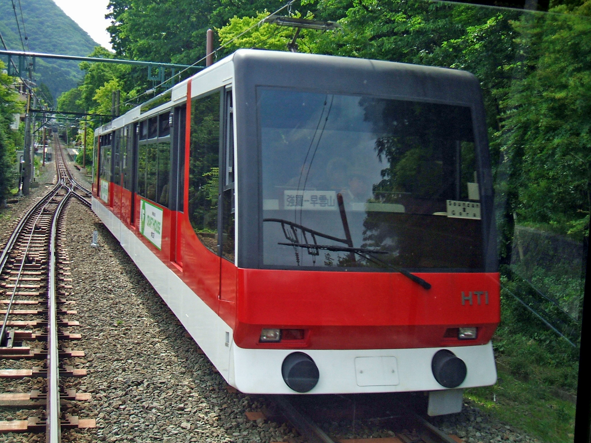 箱根登山鉄道ケ100・ケ200形客車車両外観。公園上～中強羅にて撮影。